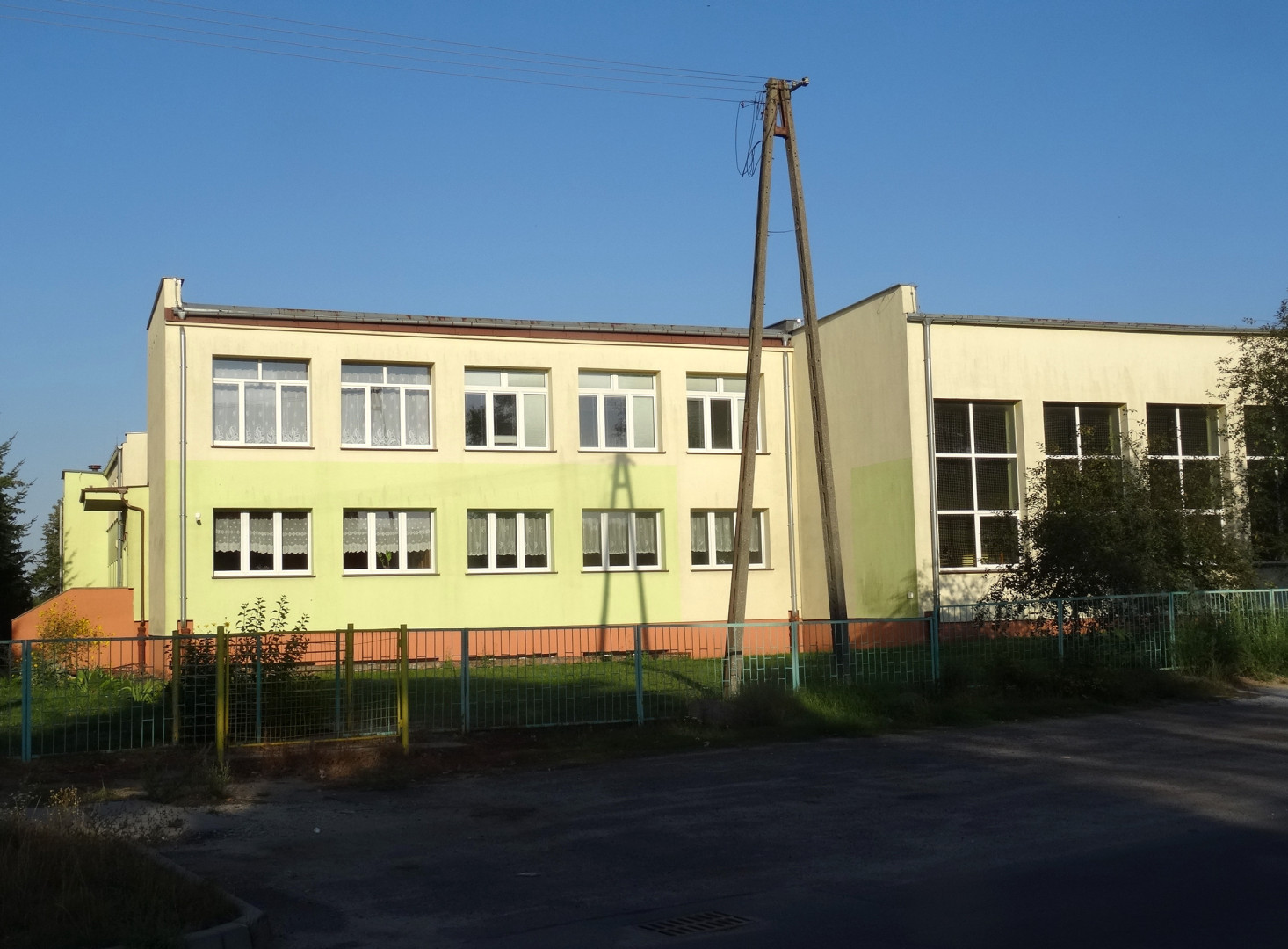 Sicienko - wieś gminna w powiecie bydgoskim, woj. kujawsko-pomorskie; na zdj. szkoła